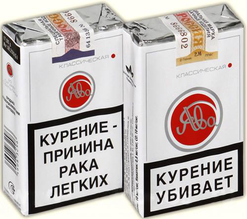 Сигареты